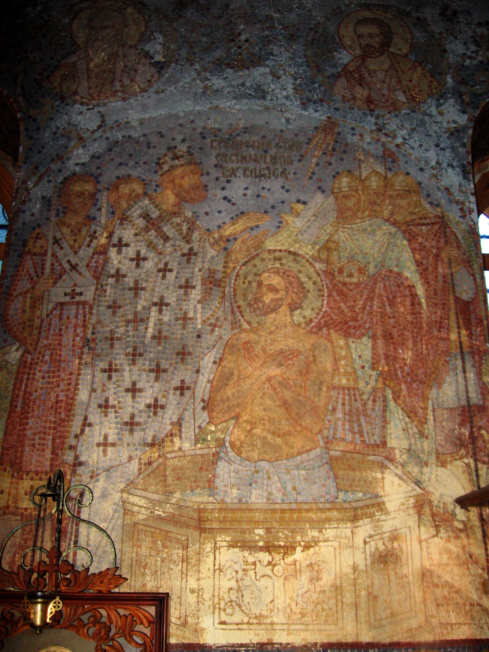 Покръстването на княз Борис I-стенопис от старозагорската църква "Свети Теодор Тирон". Стилът на стенописите е уникален и се среща единствено в Стара Загора-изображенията са пресъздадени от множество малки квадратчета в богата гама от цветове и фреските изглеждат като мозайка.